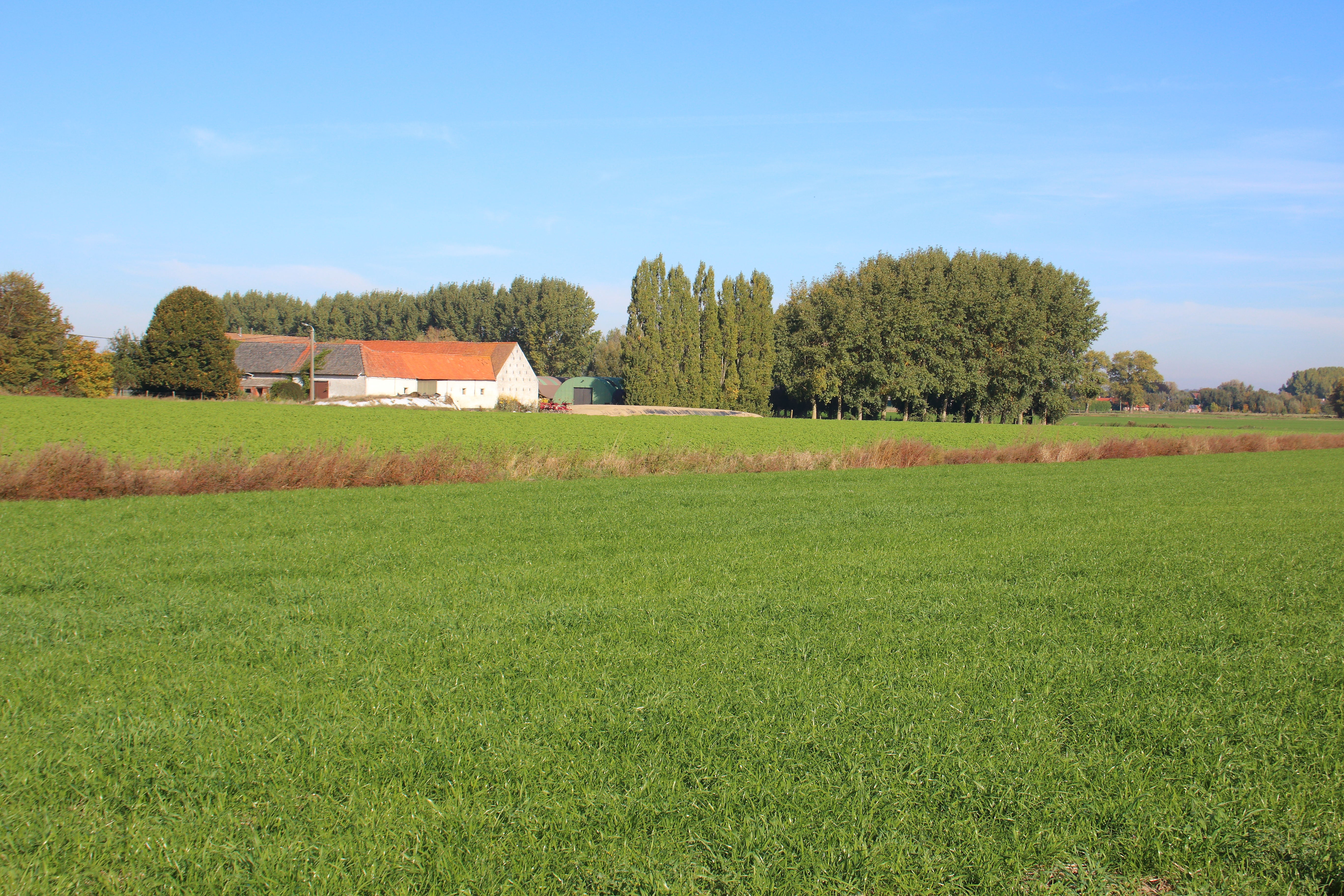 Verkeerdhof, Duivelswilg, Velzeke-Ruddershove, Zottegem, Vlaanderen, België